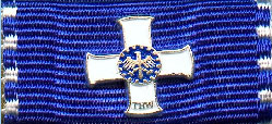 Bandschnalle des Ehrenzeich des Technischen Hilfswerks in Silber